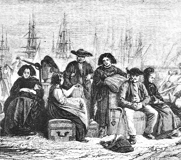 Gravure sur bois de Rontenier d'après le tableau "Les émigrants" du dessinateur Jules Théophile Schuler (1821-1878). Une famille alsacienne attendant l'embarquement au Havre vers les Amériques